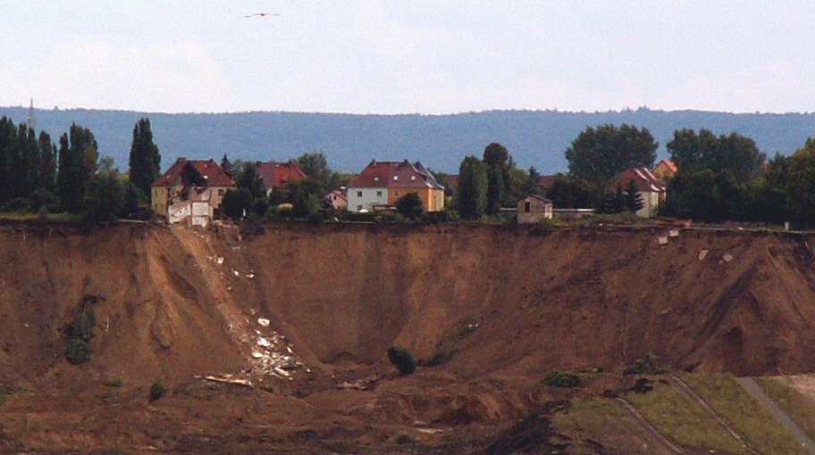 Unglücksstelle Concordiasee. Am frühen Morgen des 18. Juli 2009 kam es im Ortsbereich Nachterstedt zum Abbruch eines etwa 350 x 120 Meter breiten Landstreifens in den südlichen Ausläufer des entstehenden Concordiasees. An dieser Stelle klafft nun ein viele Meter tiefes Erdloch. Dabei wurden ein zweistöckiges Einfamilienhaus, ein Teil eines Mehrfamilienhauses sowie ein Straßenabschnitt und eine Aussichtsplattform mitgerissen.